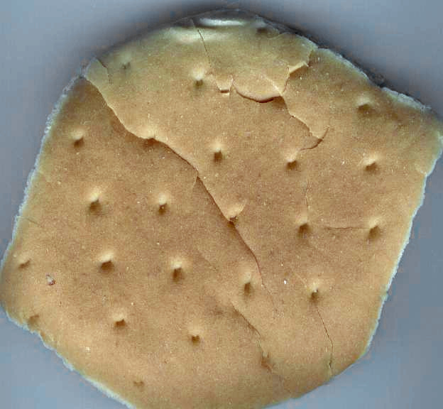 zelfgemaakte scan